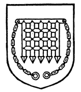 Bukórács